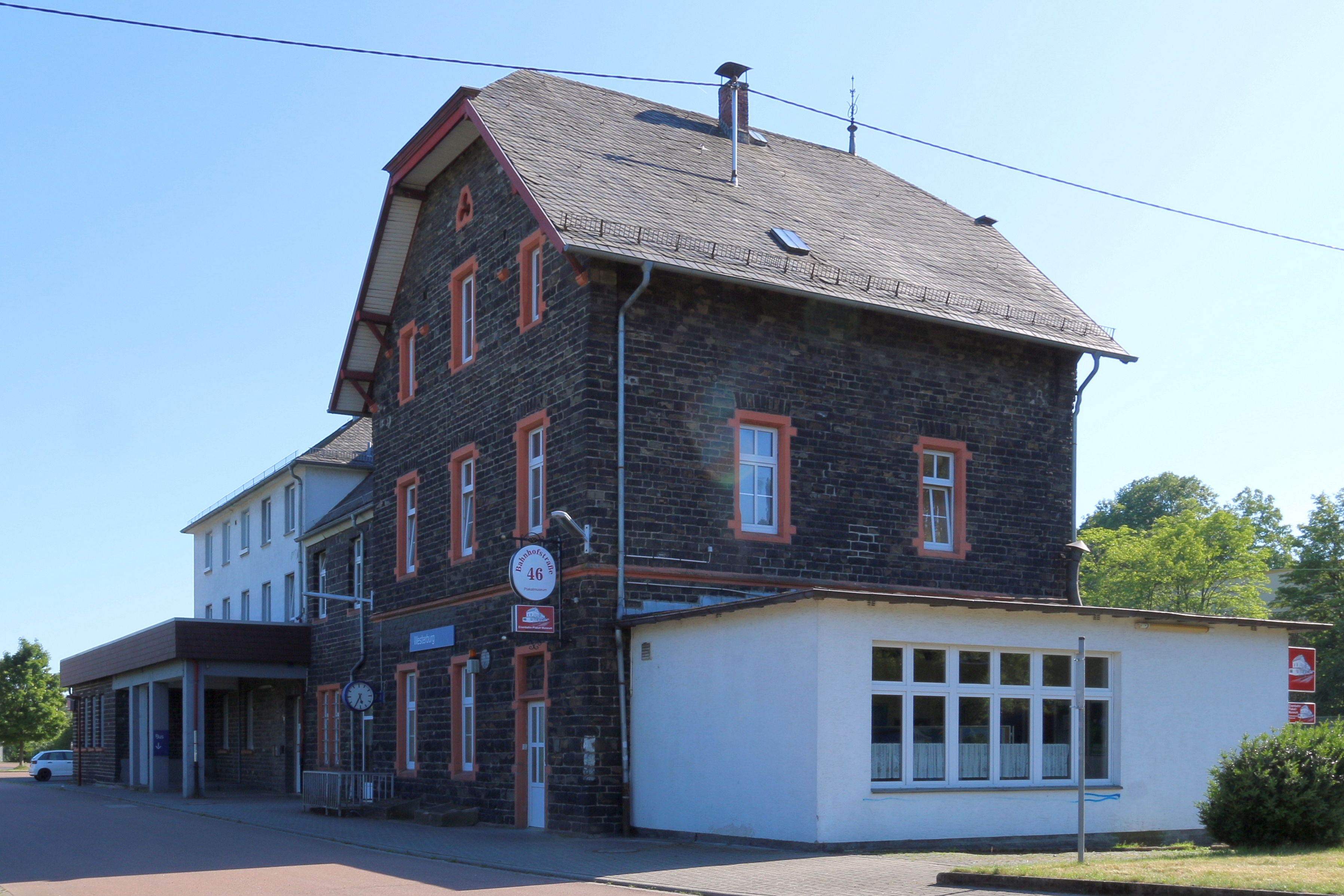 Westerburg, Westerwald: Bahnhof